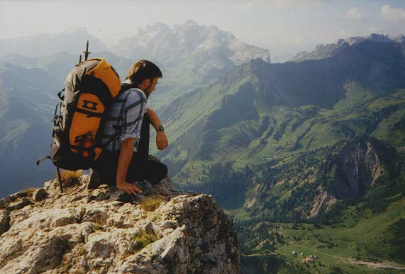 Blick vom Zimbajoch (2387 m) auf die Heinrich-Hueter-Hütte